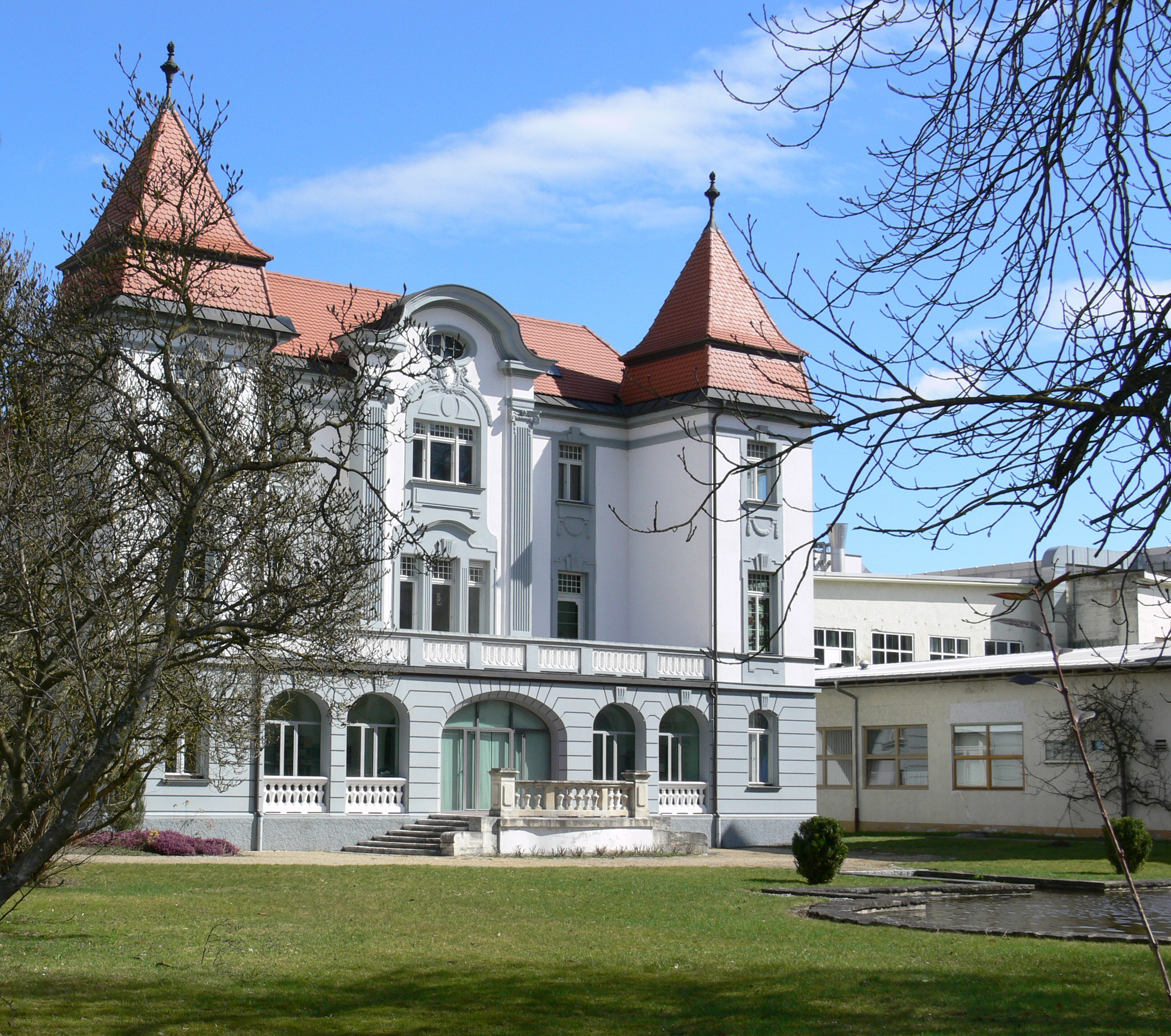 Wolpertswende, Ortsteil Mochenwangen: Papierfabrik, Villa